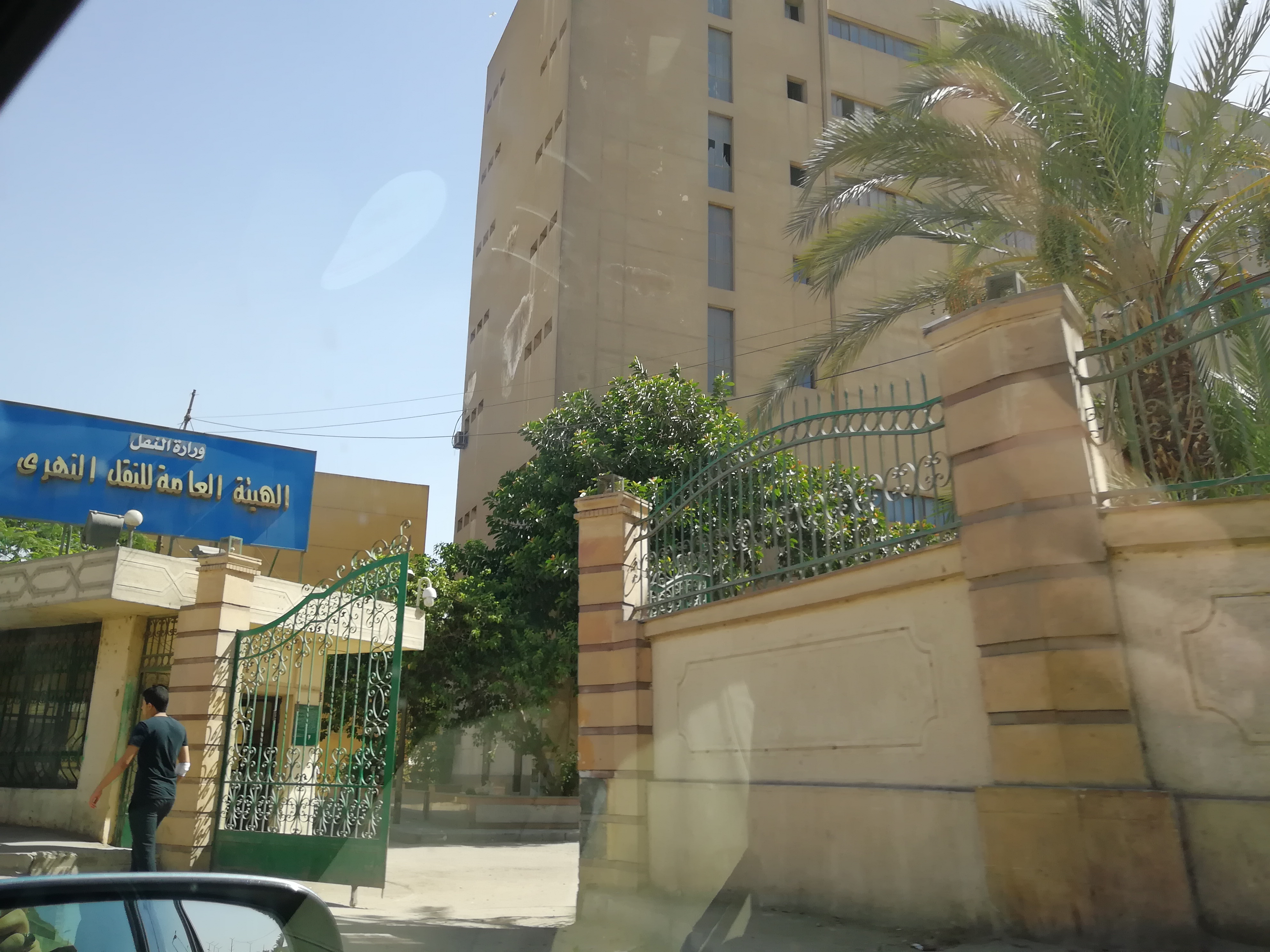 Dar-al-Salam